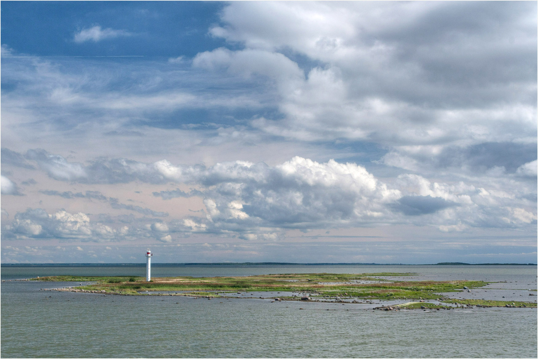 Rukkirahu